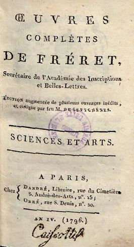 Frontespizio